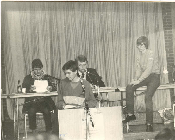 Fra talerstolen og dirigentpodiet ved Folkeskoleelevernes Landsorganisations 7. ordinære landsmøde i marts 1984 afholdt i Fredericia. På talerstolen den tiltrædende formand Bo Libergren (1984-1986), til højre den afgående formand Erik Bilde (1983-1984). Som dirigenter Jesper Ib (tv) og Lars Christian Lilleholt.